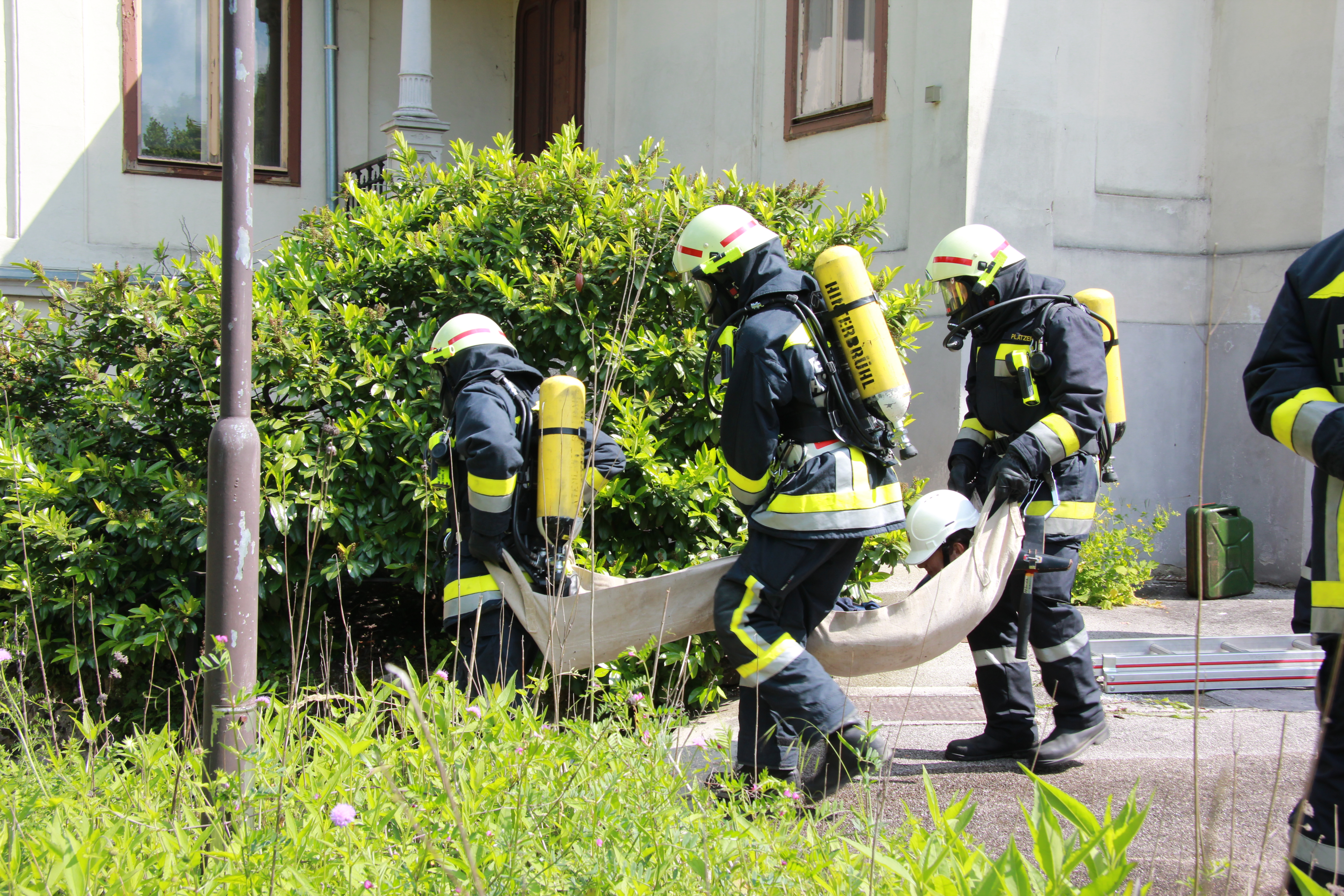 Einsatz eines Tragetuches im Zuge einer Feuerwehrübung in NIederösterreich